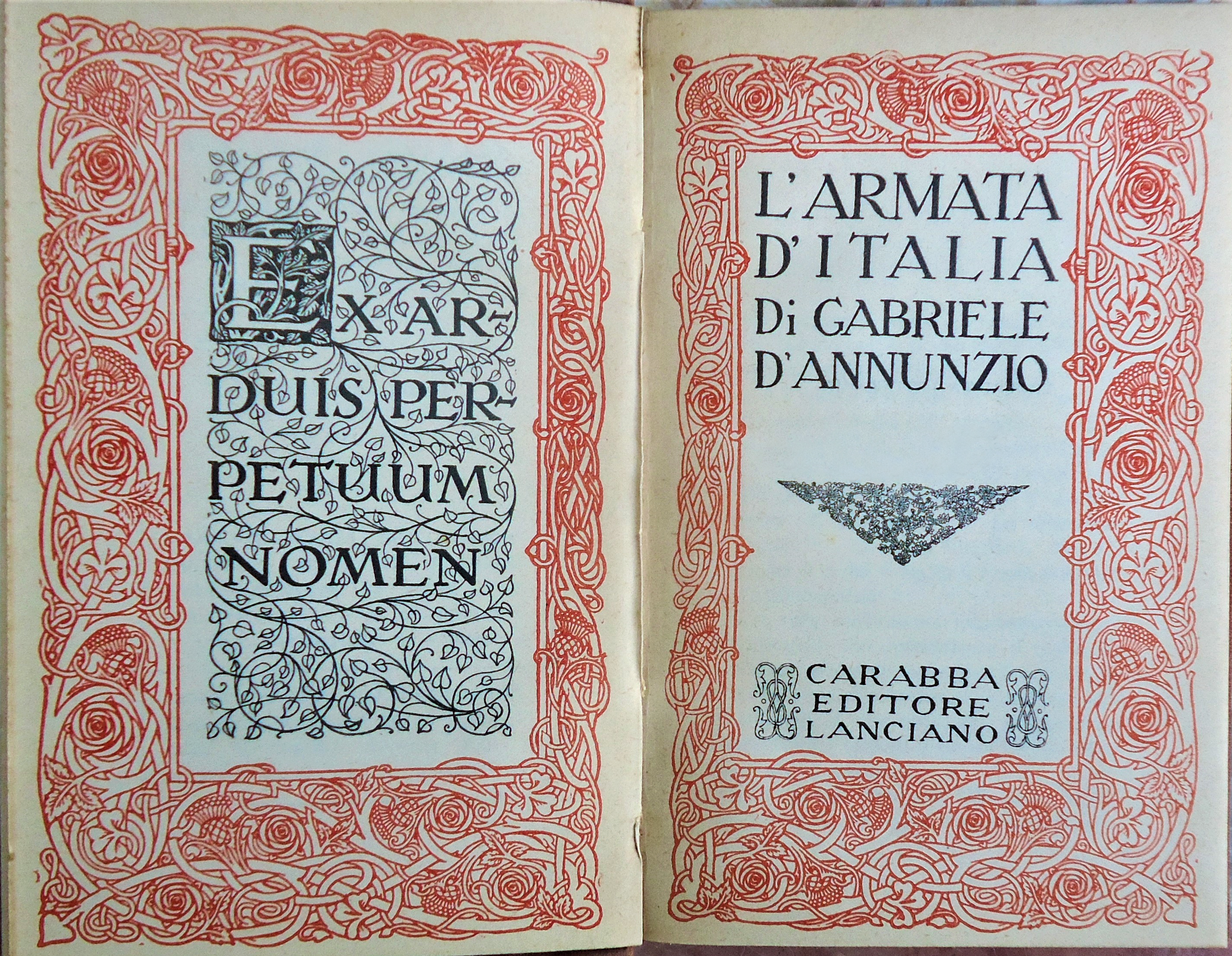 Collana Scrittori italiani e stranieri. (Collezione Fausta Samaritani-D'Annunzio)